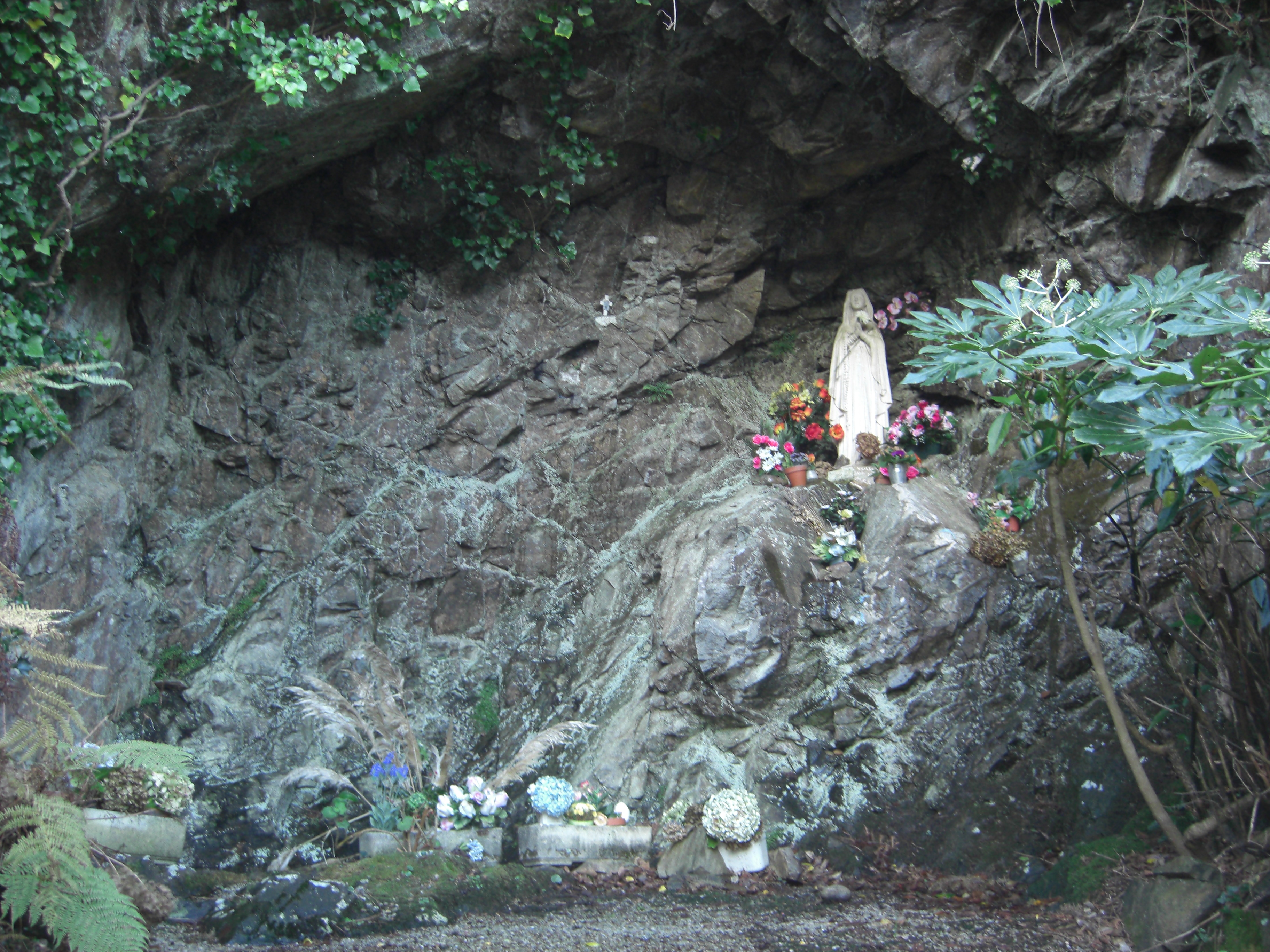 Grotte d'Omonville-la-Rogue